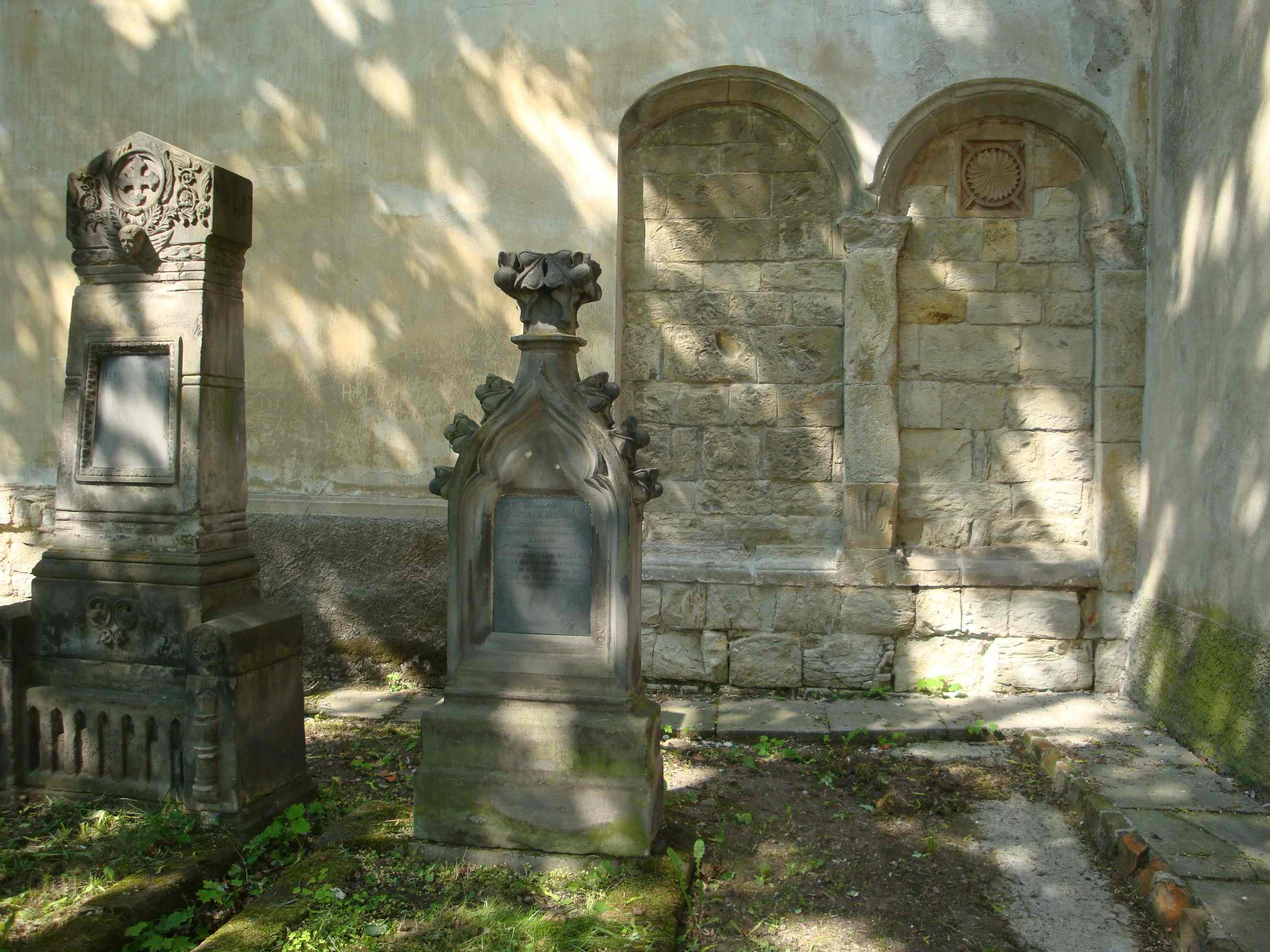 Cítov, kostel, románský oblouk